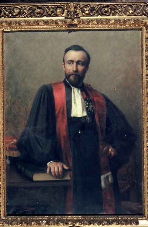 Portrait par Jules Aviat